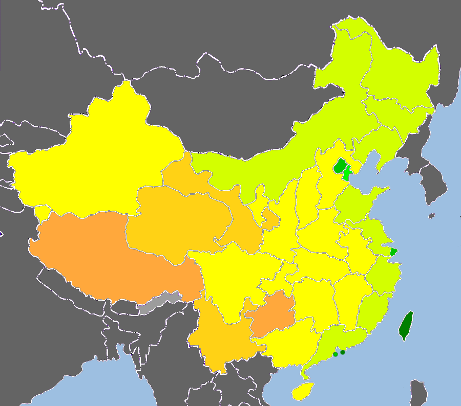 2010中国人类发展指数